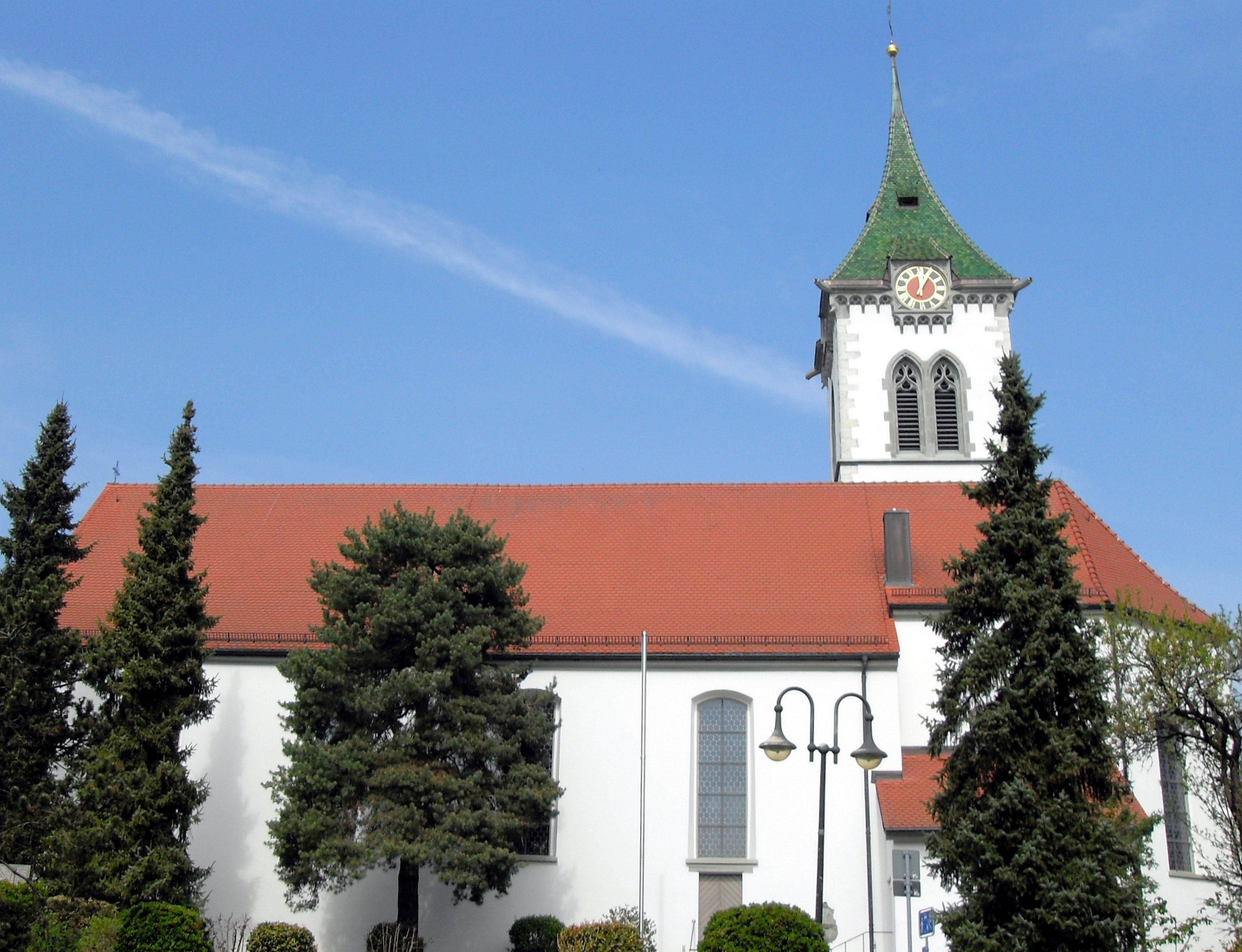 Katholische Kirche St. Valentin in Lottstetten